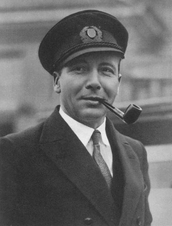 Captain Ernst August Lehmann (12 May 1886 - 7 May 1937) was a German Zeppelin captain